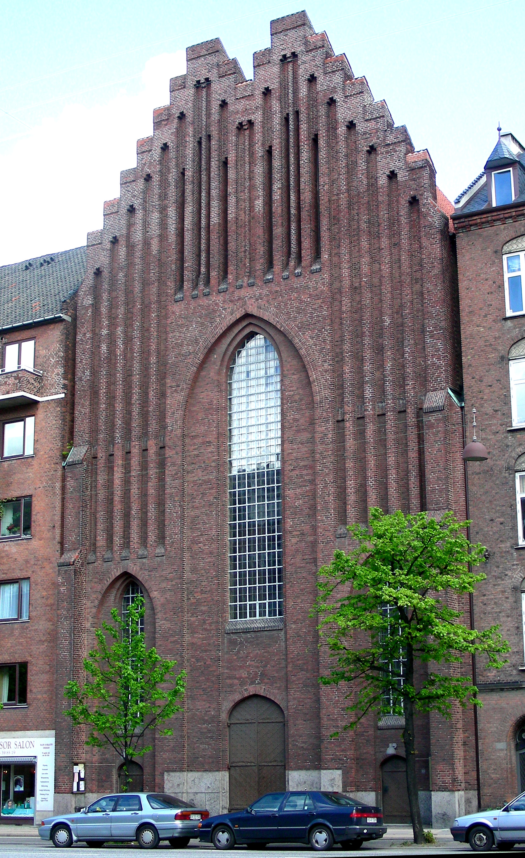 Bethlehemskirken, Copenhagen, Denmark.